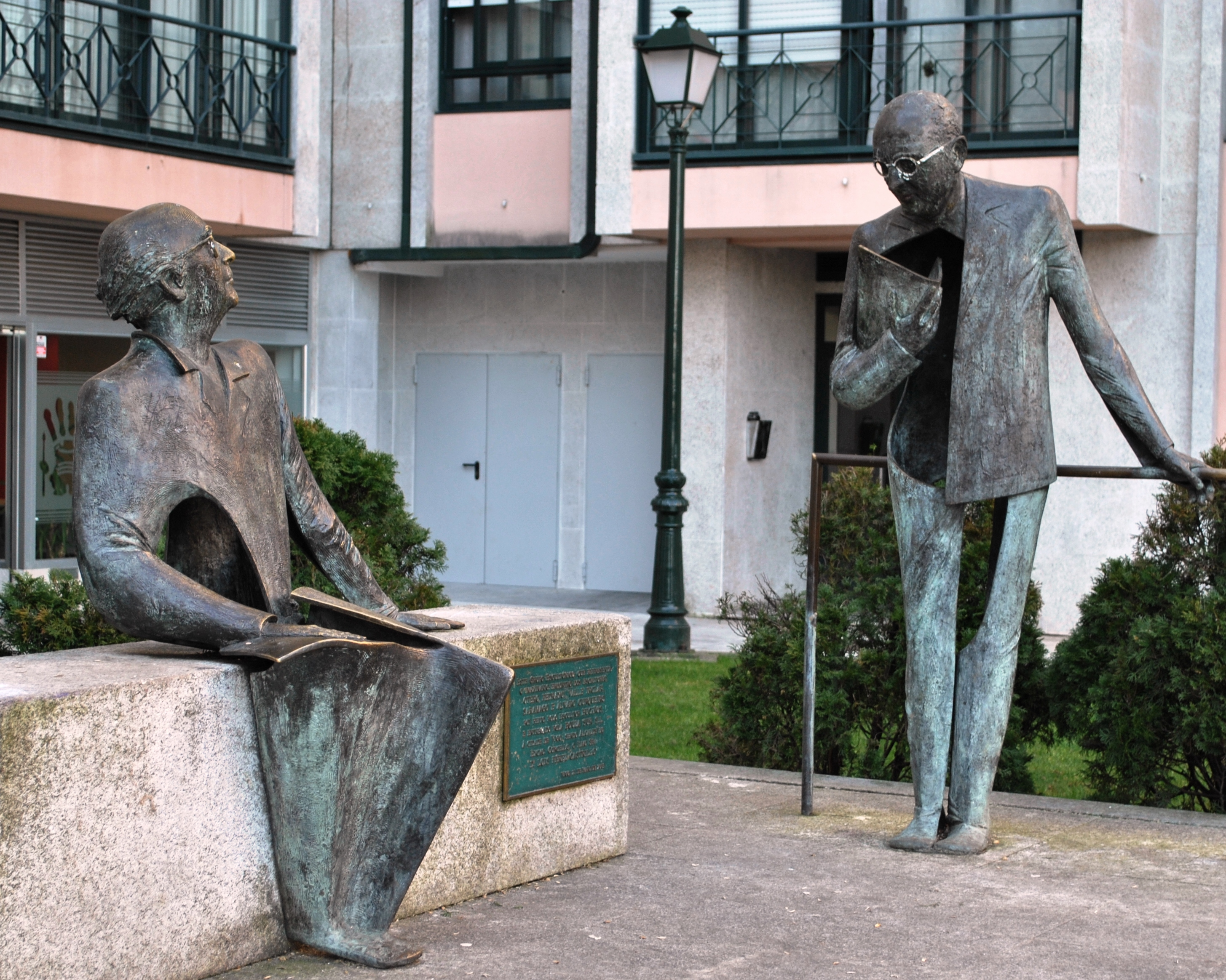 Conxunto de Buciños en Bouzas, José Saramago e Álvaro Cunqueiro.jpg